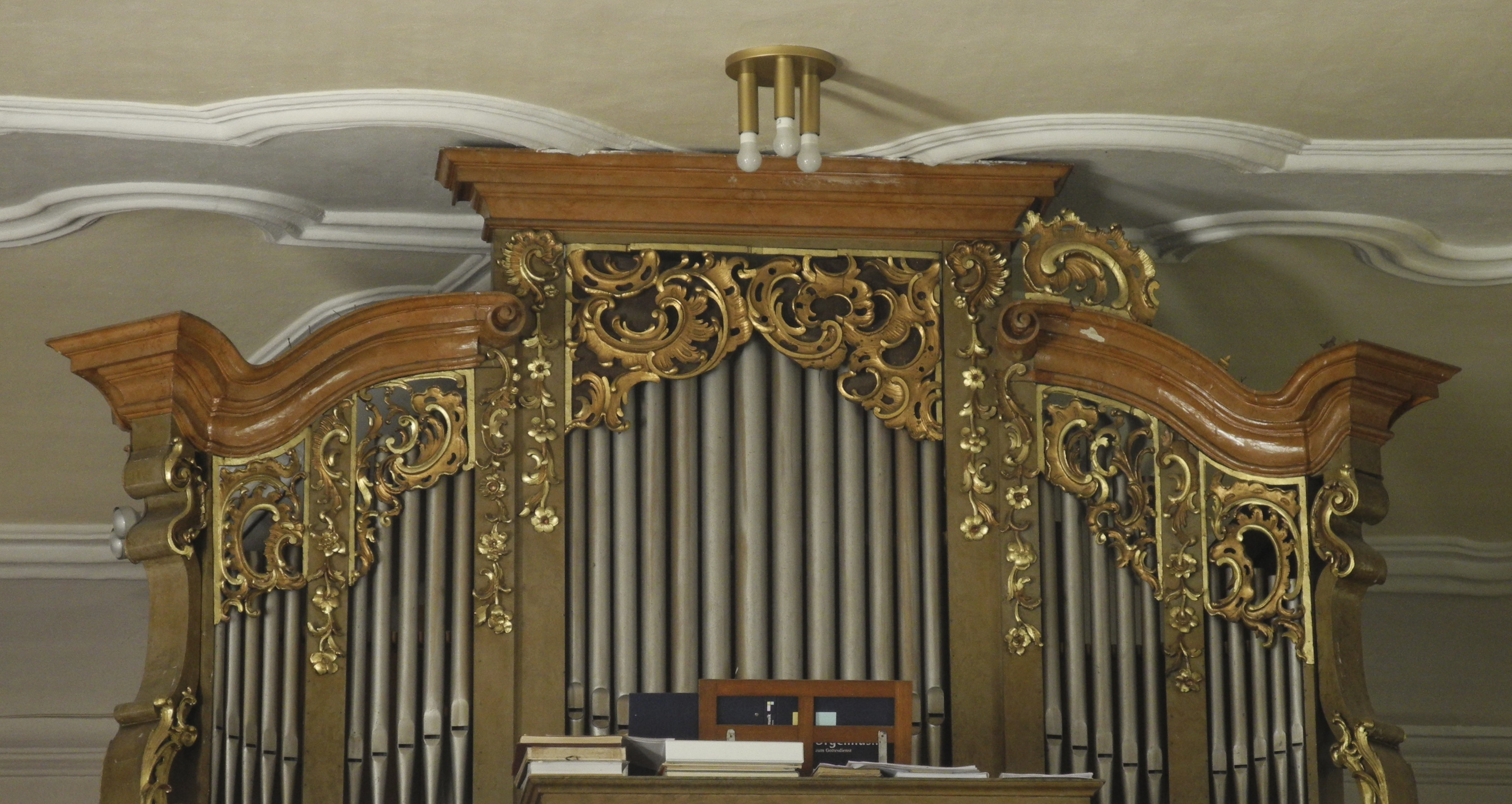 Weiherhammer, Ortsteil Markt Kaltenbrunn, Evangelische Kirche St. Martin, Orgel, Gehäuse: Funtsch; Werk Maerz 1905 (10/I/P)